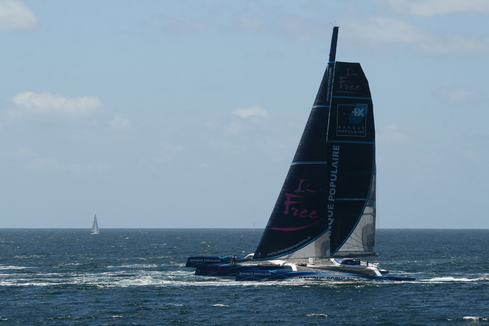 Banque Populaire V accompagnant la Volvo Ocean Race venant de Lorient allant vers les coureaux de Belle-Ile